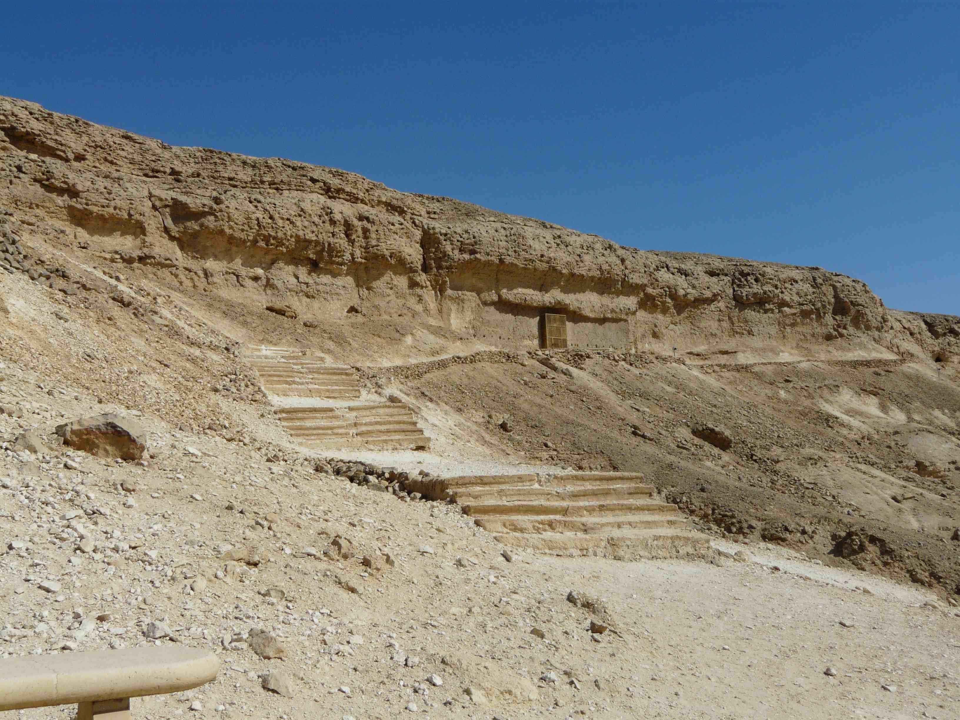 Amarna - Accès aux tombes nord